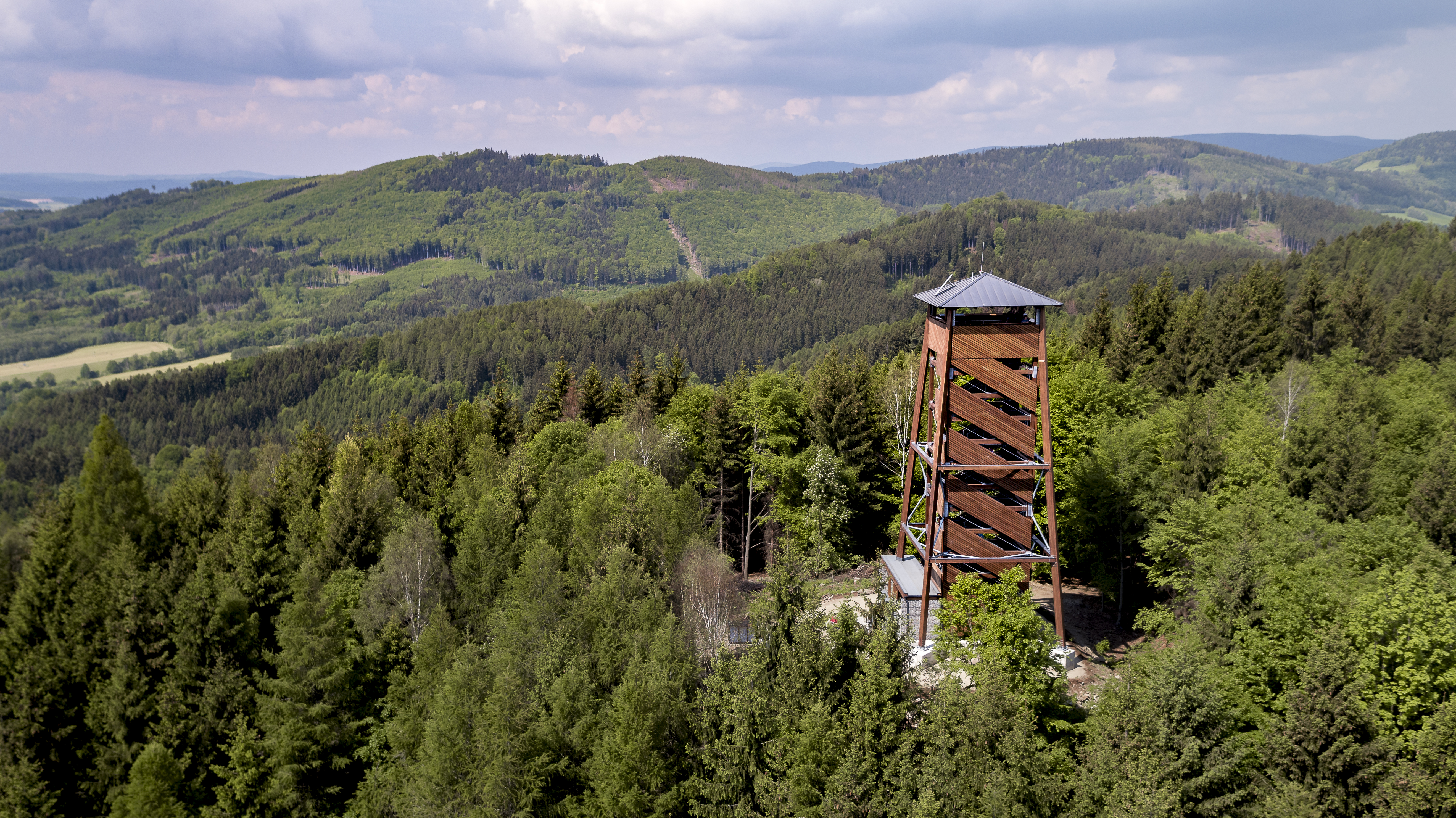 Zdroj: Obec Rapotín